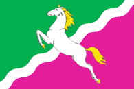 Флаг Новощербиновского сельского поселения, Краснодарский край, Россия.